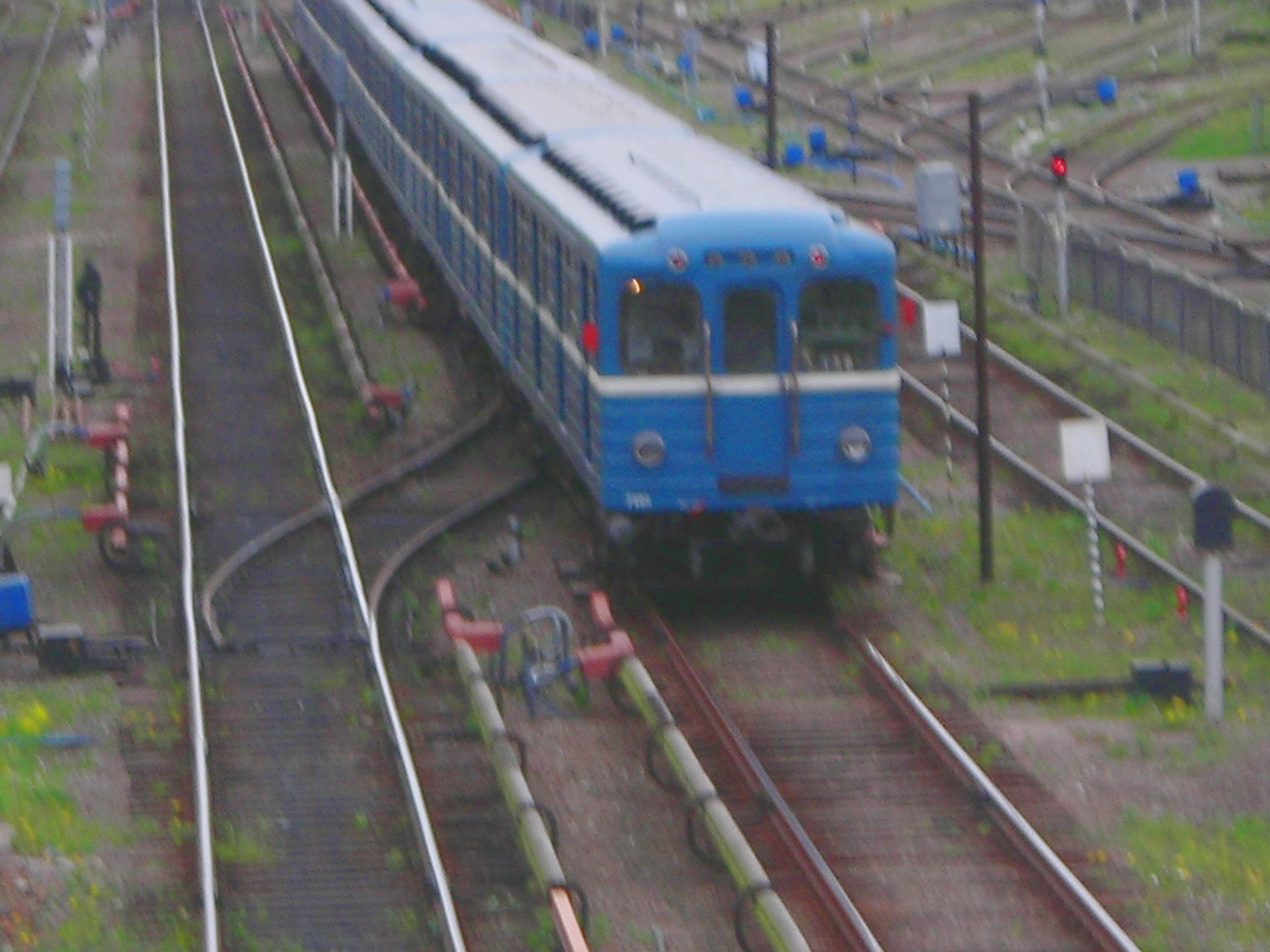 Вагон метро типа «Ем» Состав, заходящий в депо